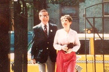 Sheldon Kranz and Anne Fielding